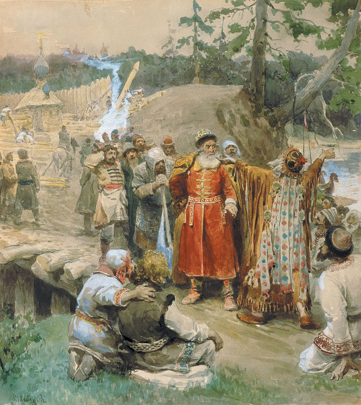 Освоение русскими новых земель. 1904. Бумага, акварель. Вологодская областная картинная галерея